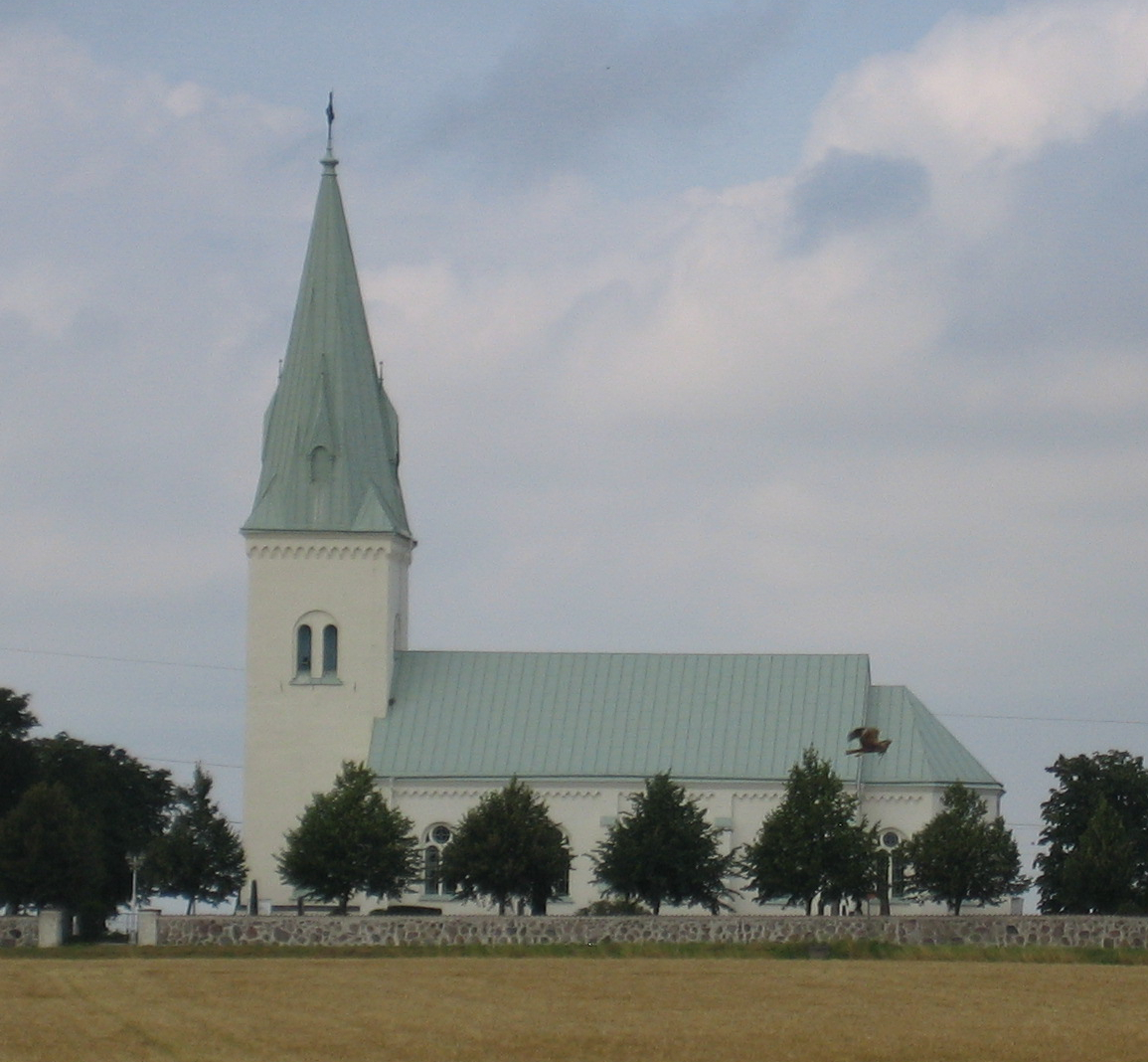 Södra Åkarps kyrka.